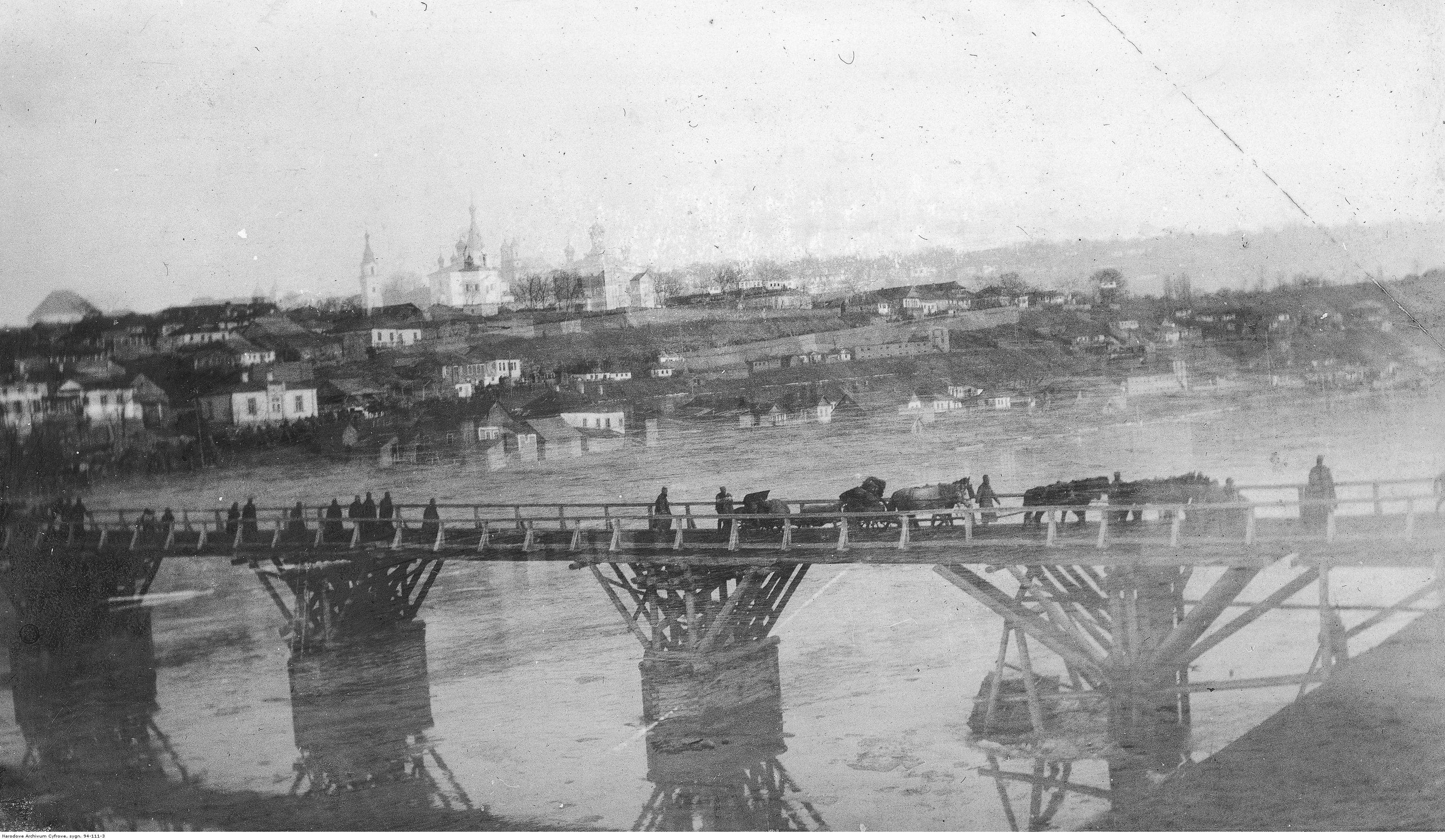 Na moście widoczni żołnierze rosyjscy i zaprzęg artyleryjski. W oddali panorama Żwańca.